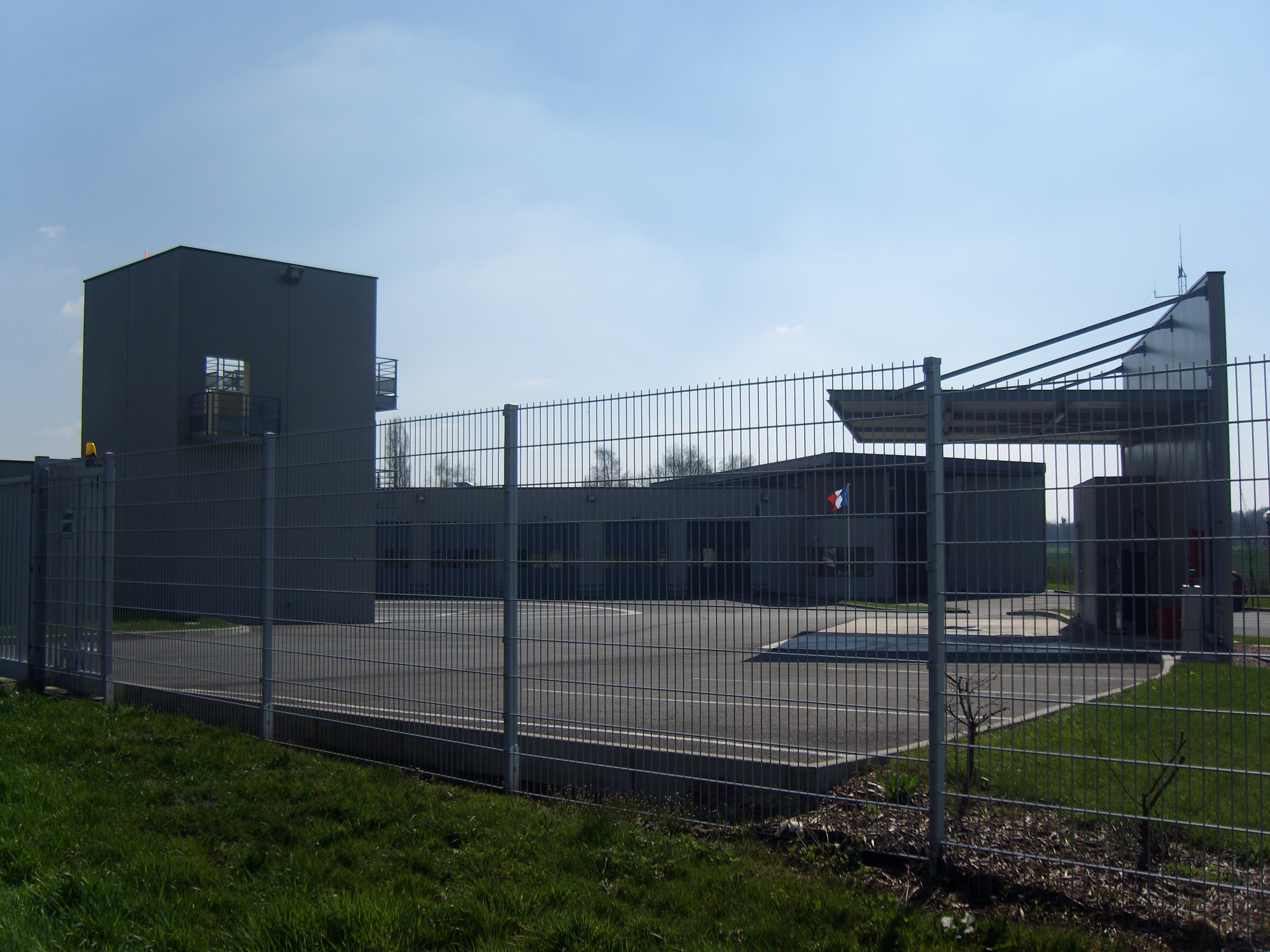 Centre d'intervention et de secours de Fontenay-Trésigny